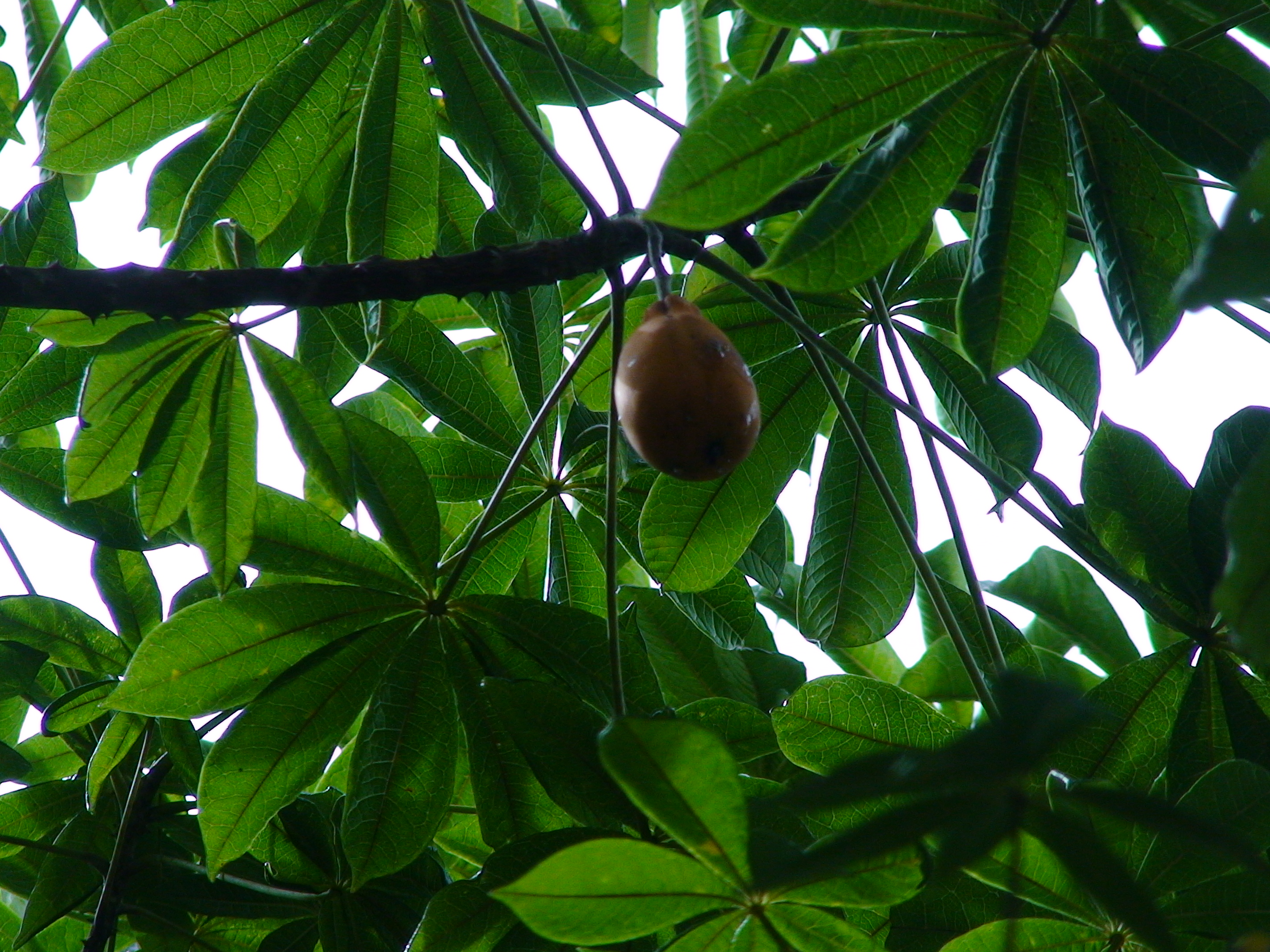 Fruto maduro